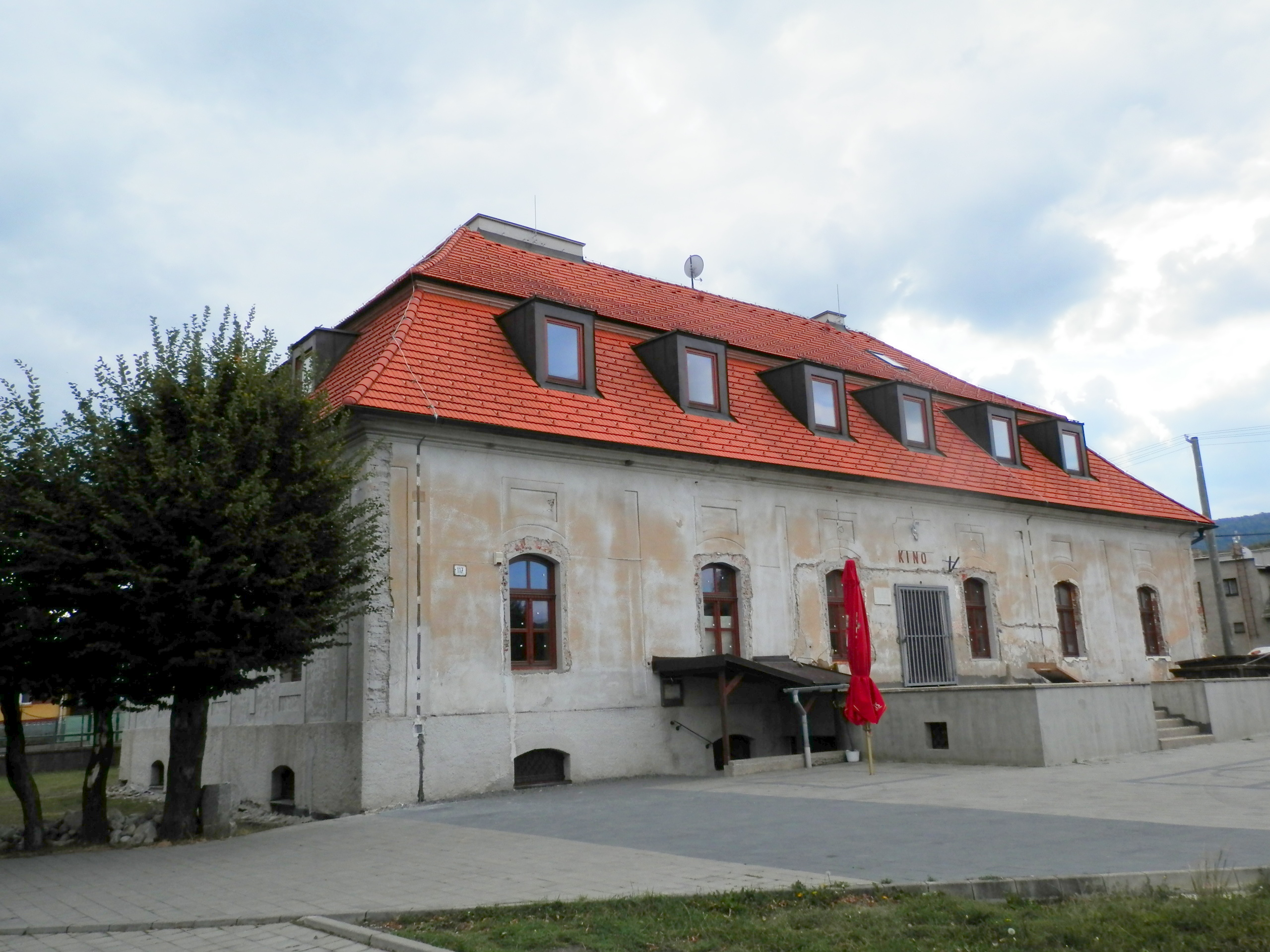 Obec Rožkovany, kaštieľ okres Sabinov.